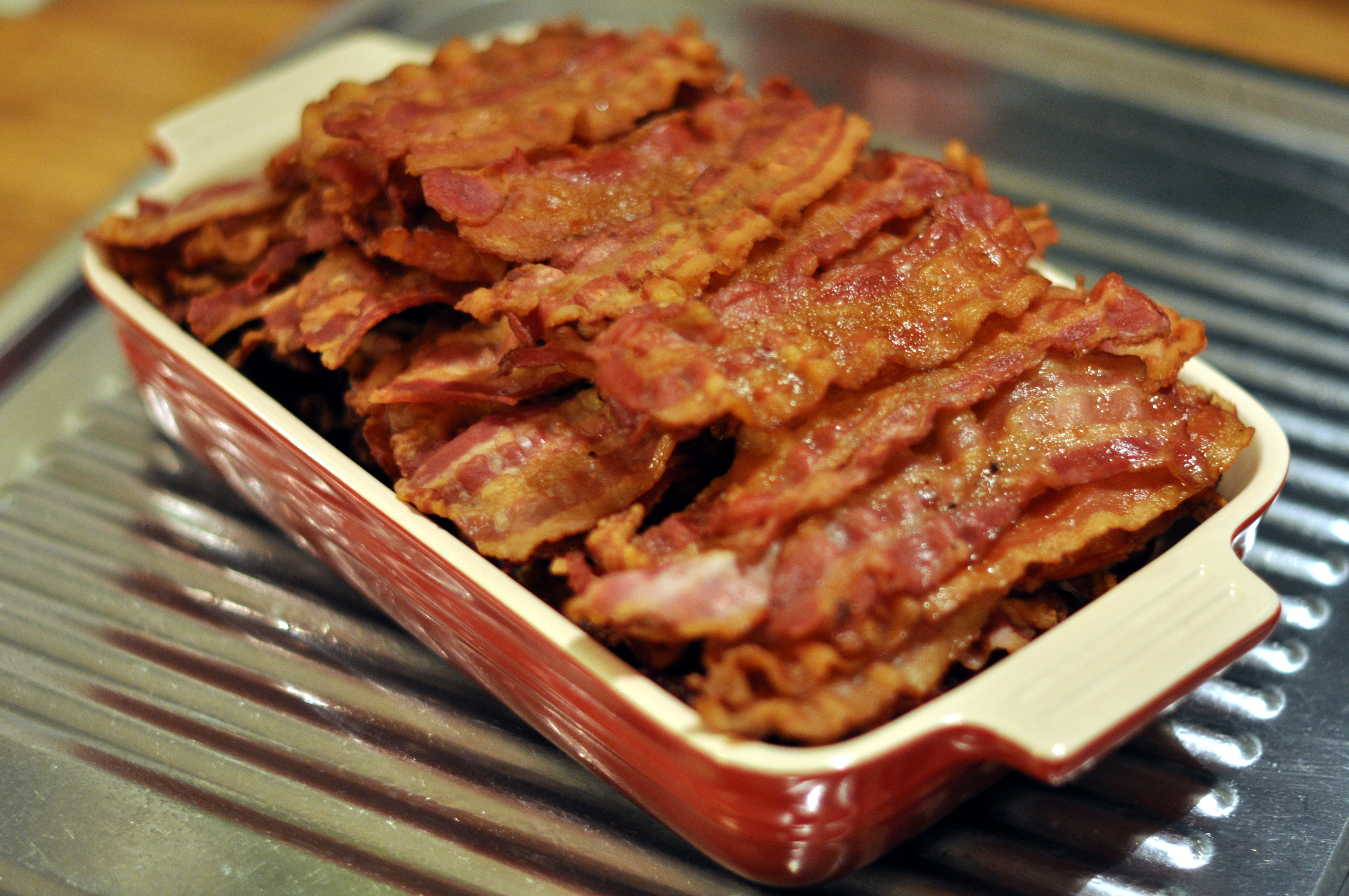 Bacon